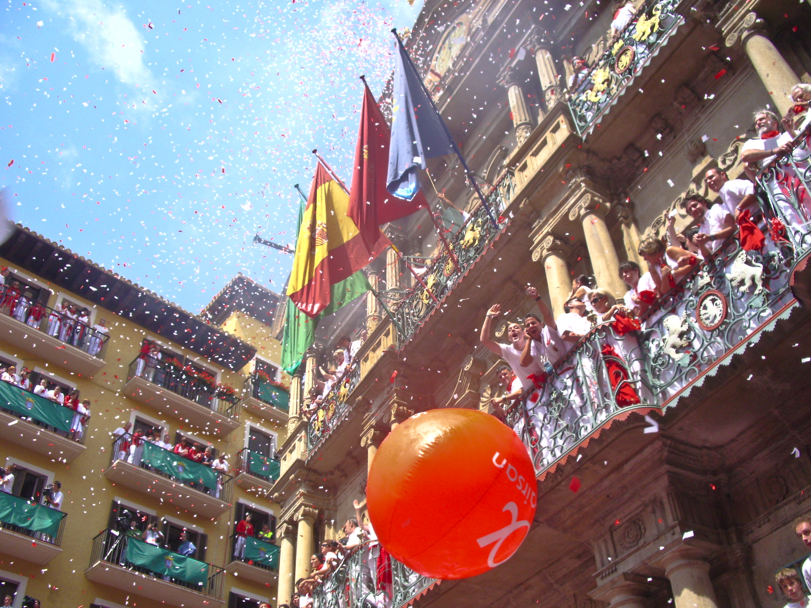 En la Plaza del Ayuntamiento de Pamplona, España, momentos después del chupinazo que inicia los Sanfermines de 2008.